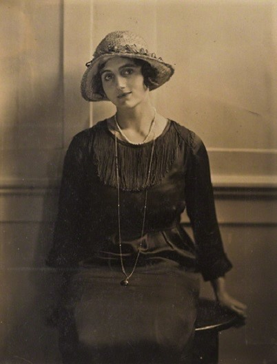 Meggie Albanesi